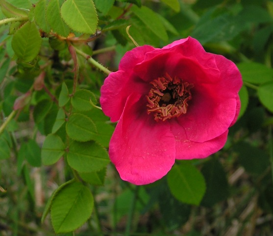 Rosa 'Syvdal'